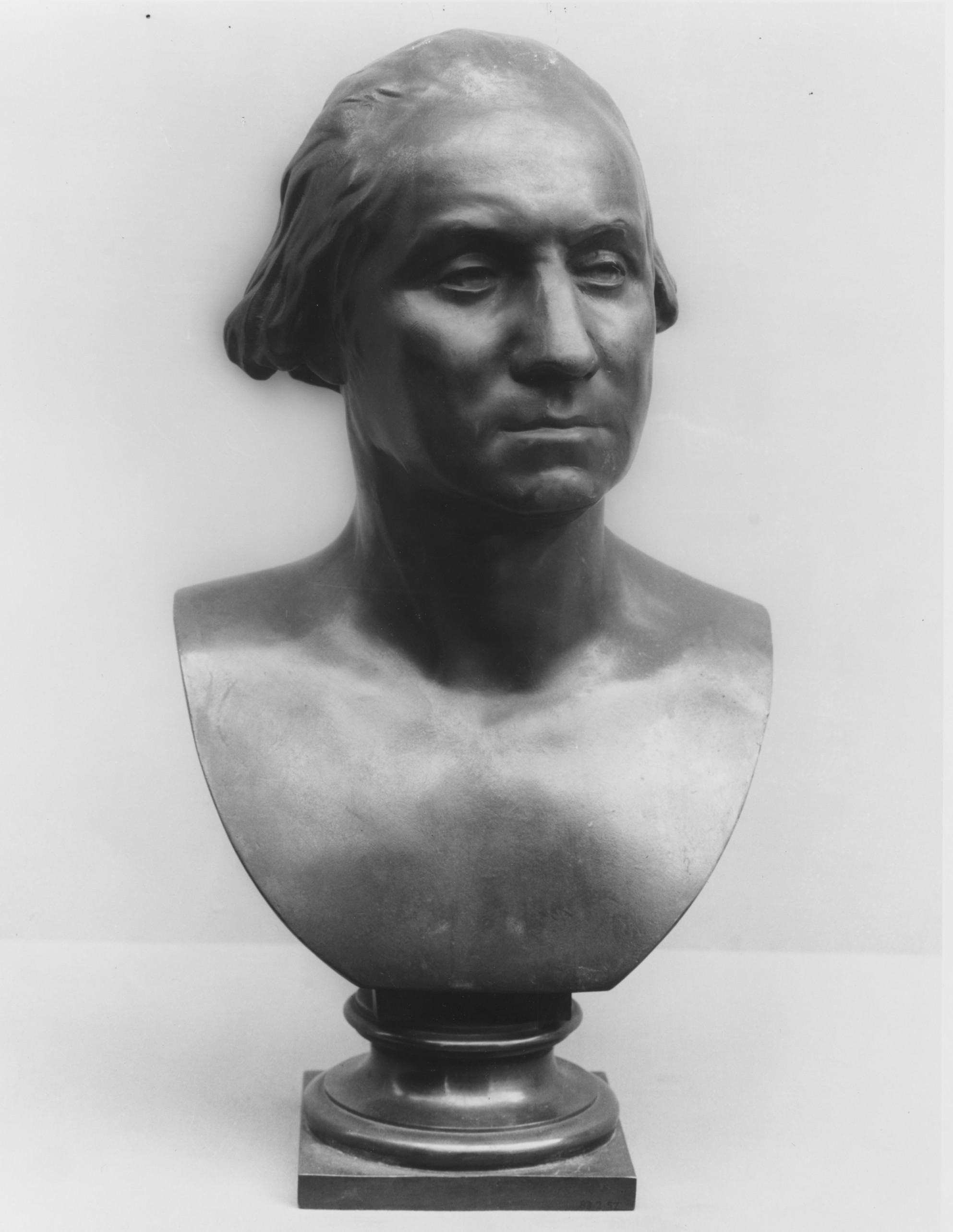 Bust; Sculpture